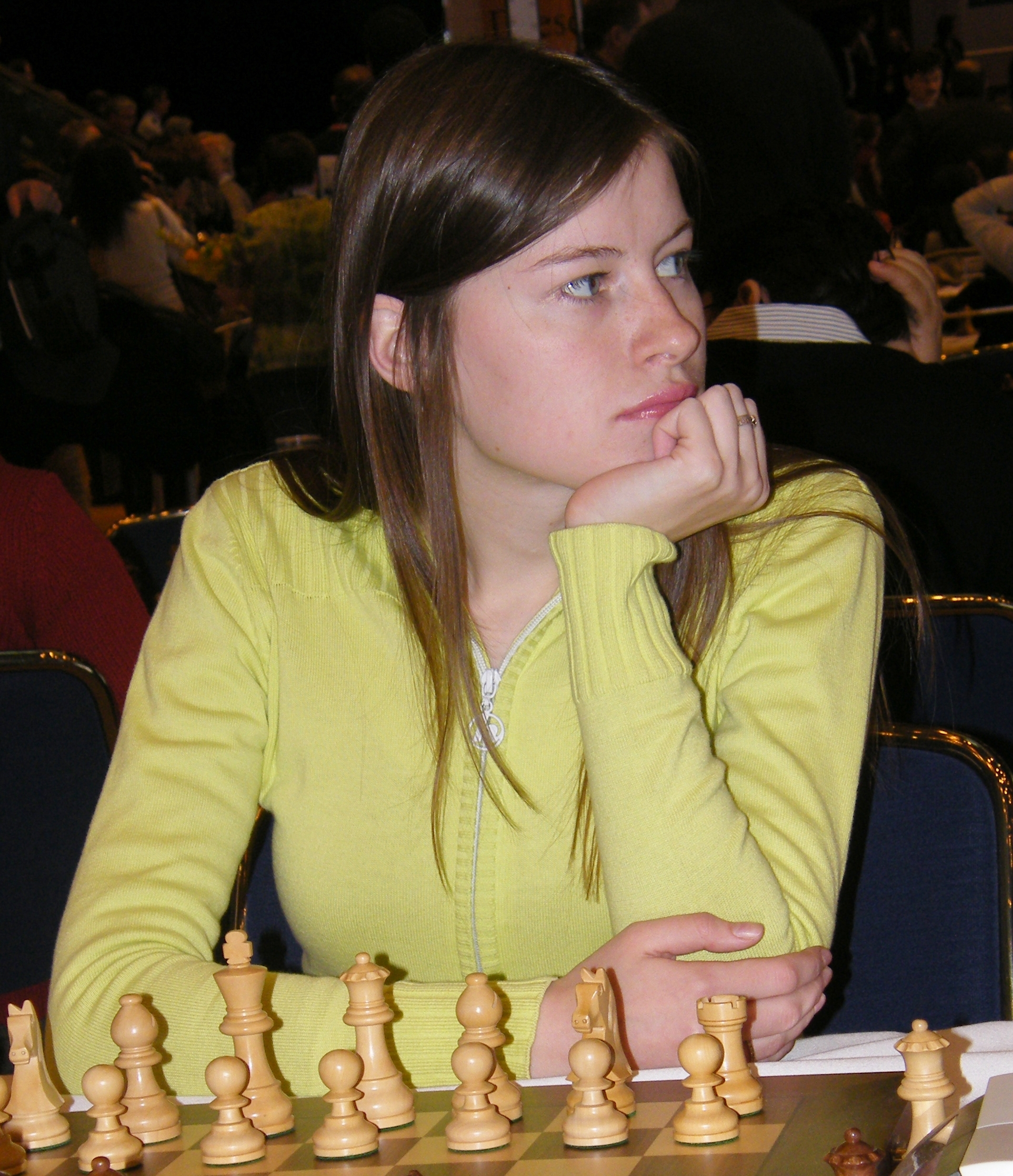 Natalja Pogonina bei der 38. Schacholympiade in Dresden 2008